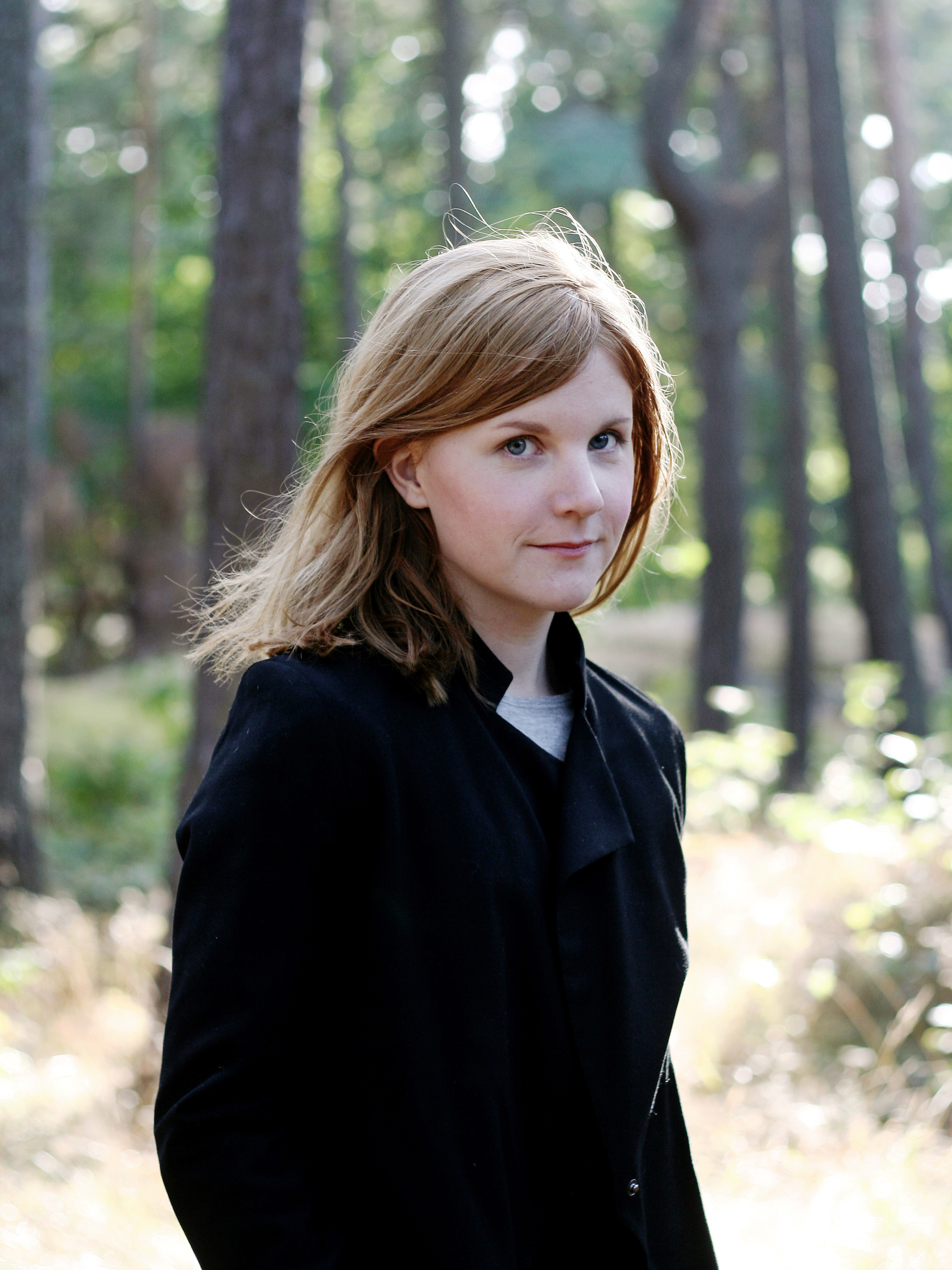 Lisen Adbåge